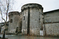 Melusin Propriétaire des négatifs et de la haute définition.